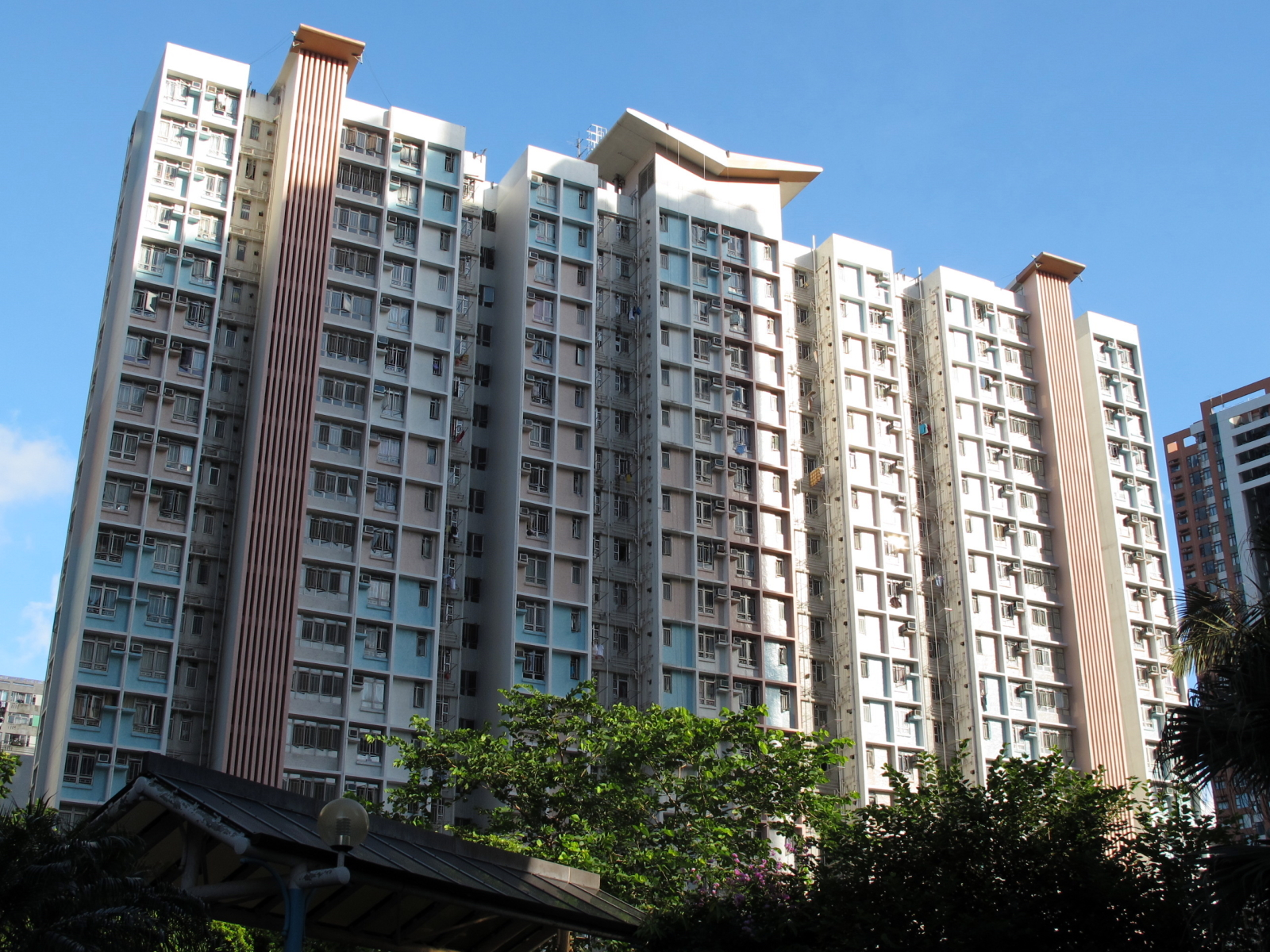 Tsui Wan Estate Tsui Luk House 翠灣邨 翠祿樓